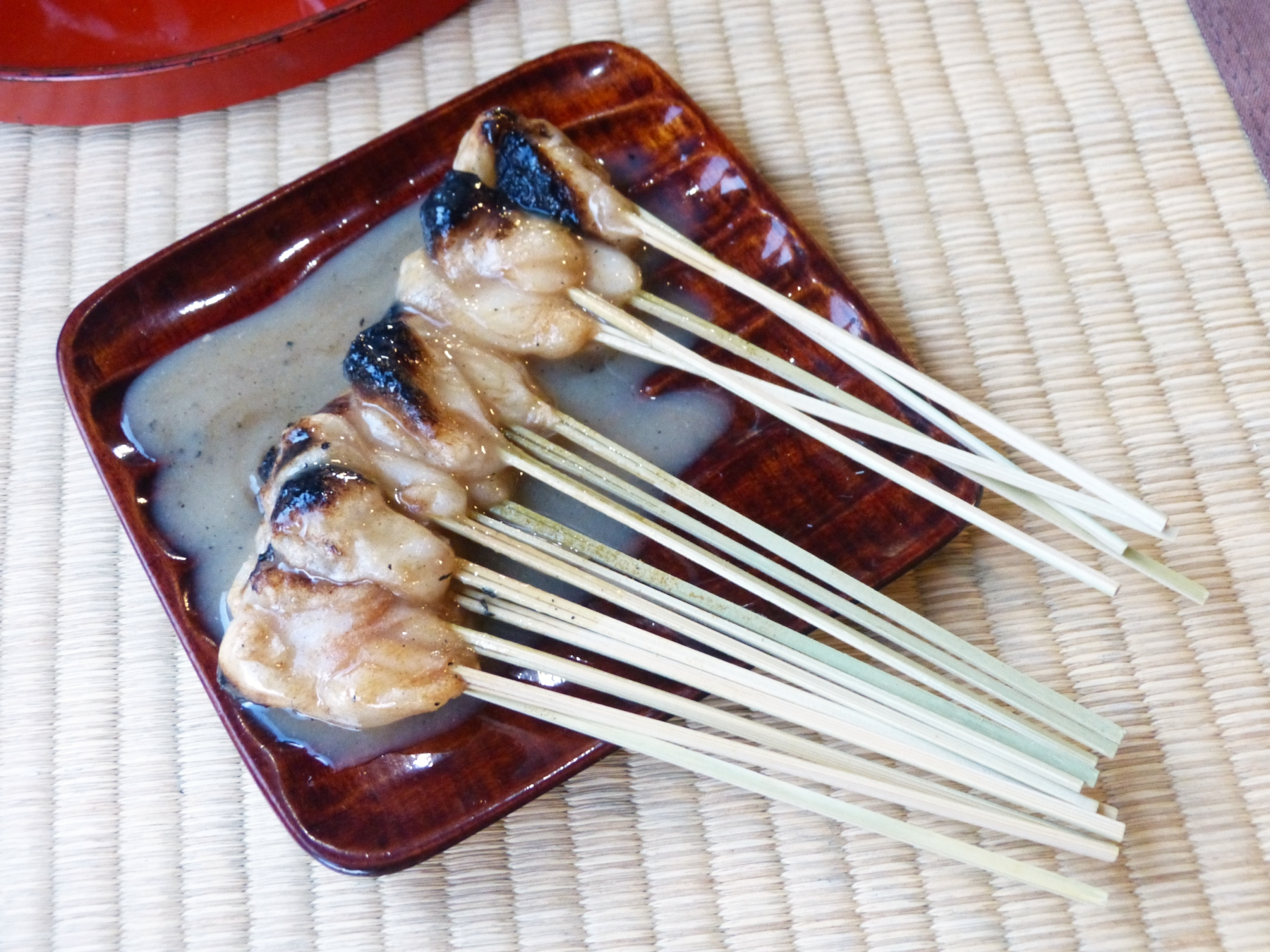 京都市、今宮神社の横にある老舗「一文字屋和輔(一和)」のあぶり餅